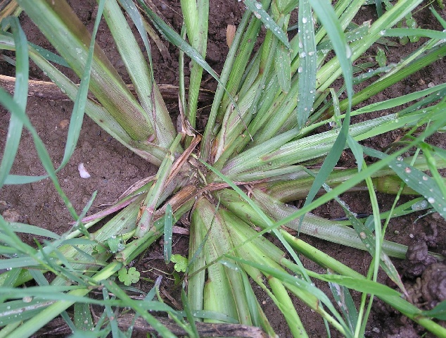 Echinochloa crus-galli am Rande eines Maisfeldes bei Neuss (in Deutschland). Verzweigung an der Stängelbasis, mit abgeflachten Blattscheiden.